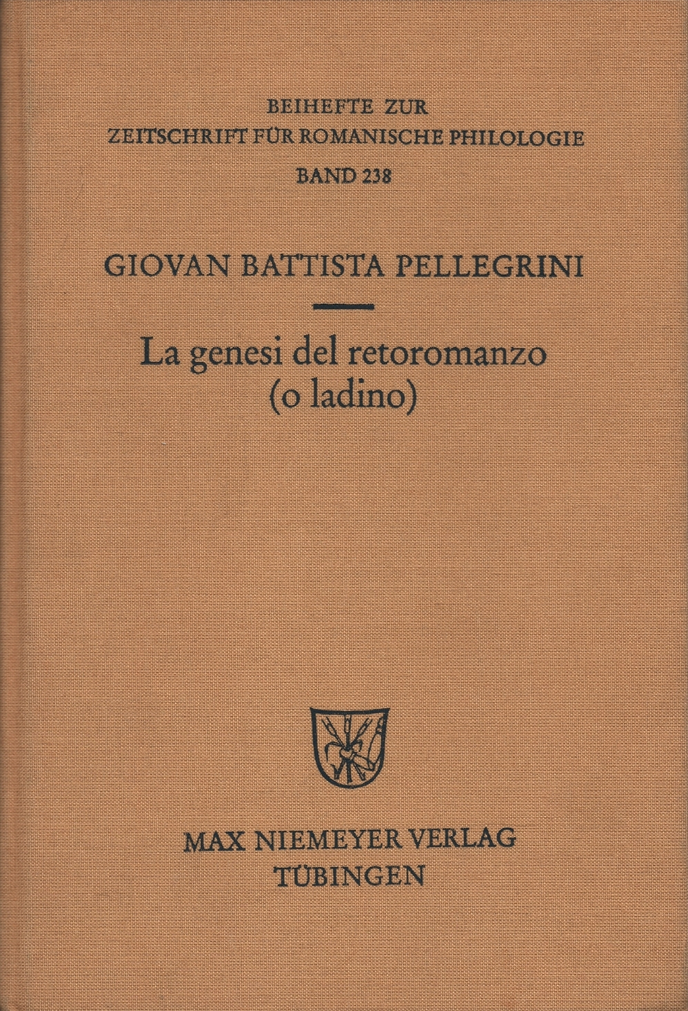 Copertina del libro "La genesi del Retoromanzo (o ladino)" di Giovan Battista Pellegrini